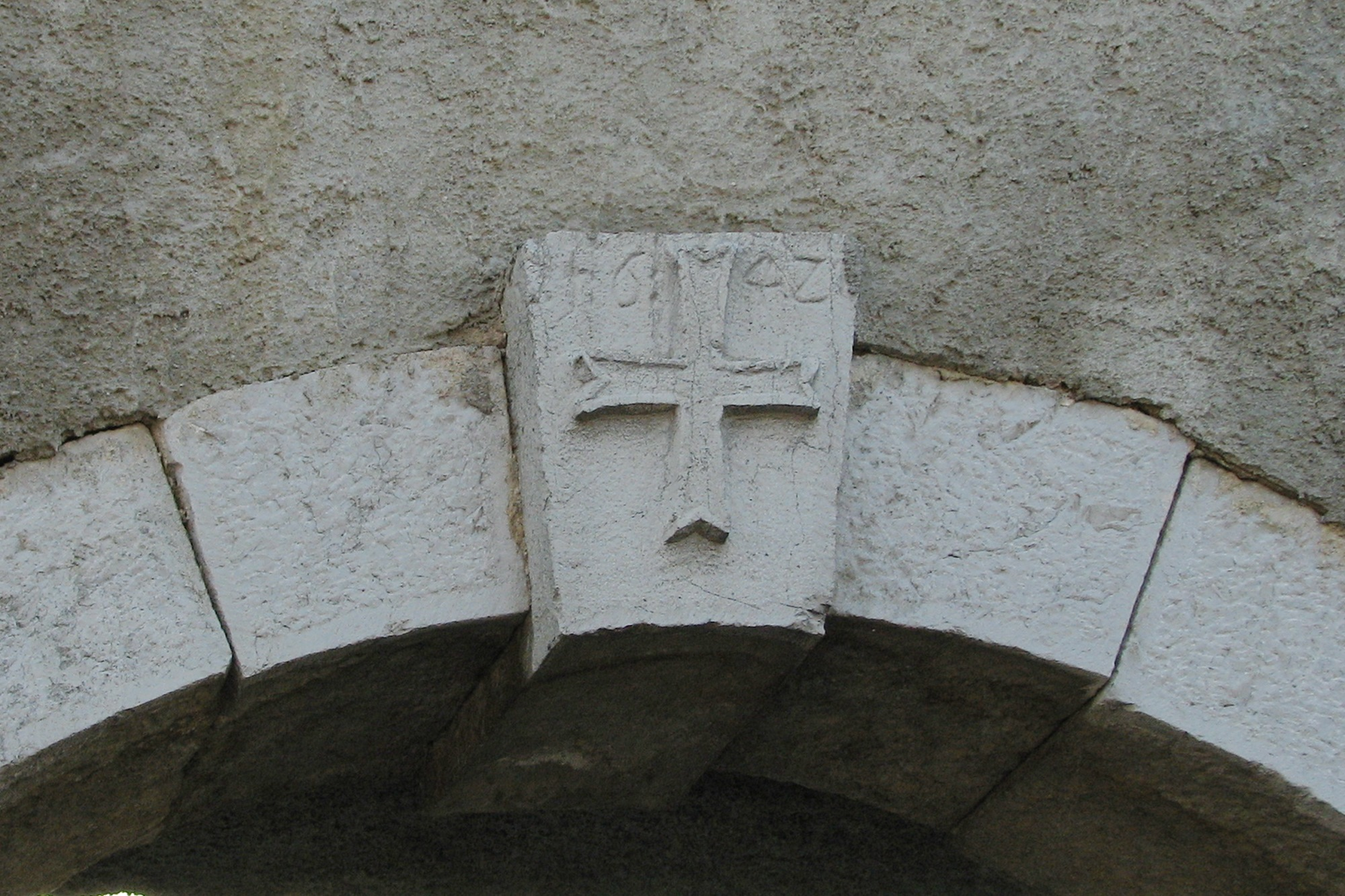 Grb križnikov na vhodnem portalu metliškega obrambnega zidu